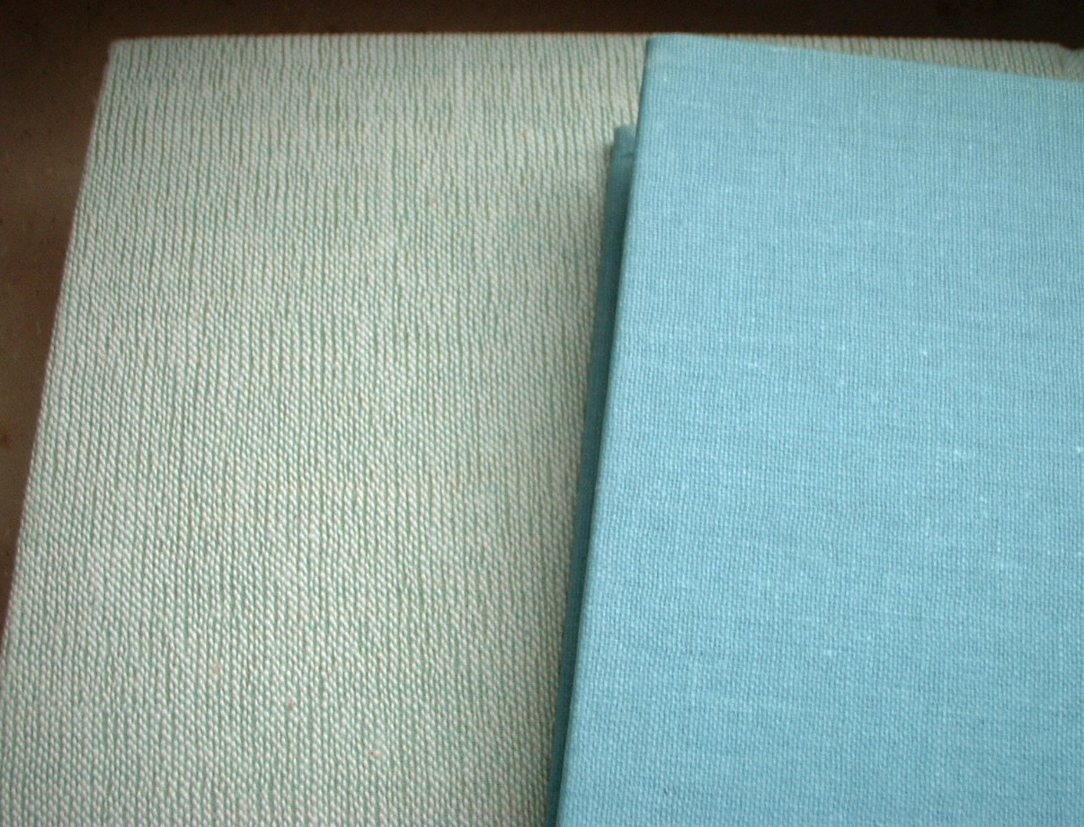 In Kaliko gebundene Bücher